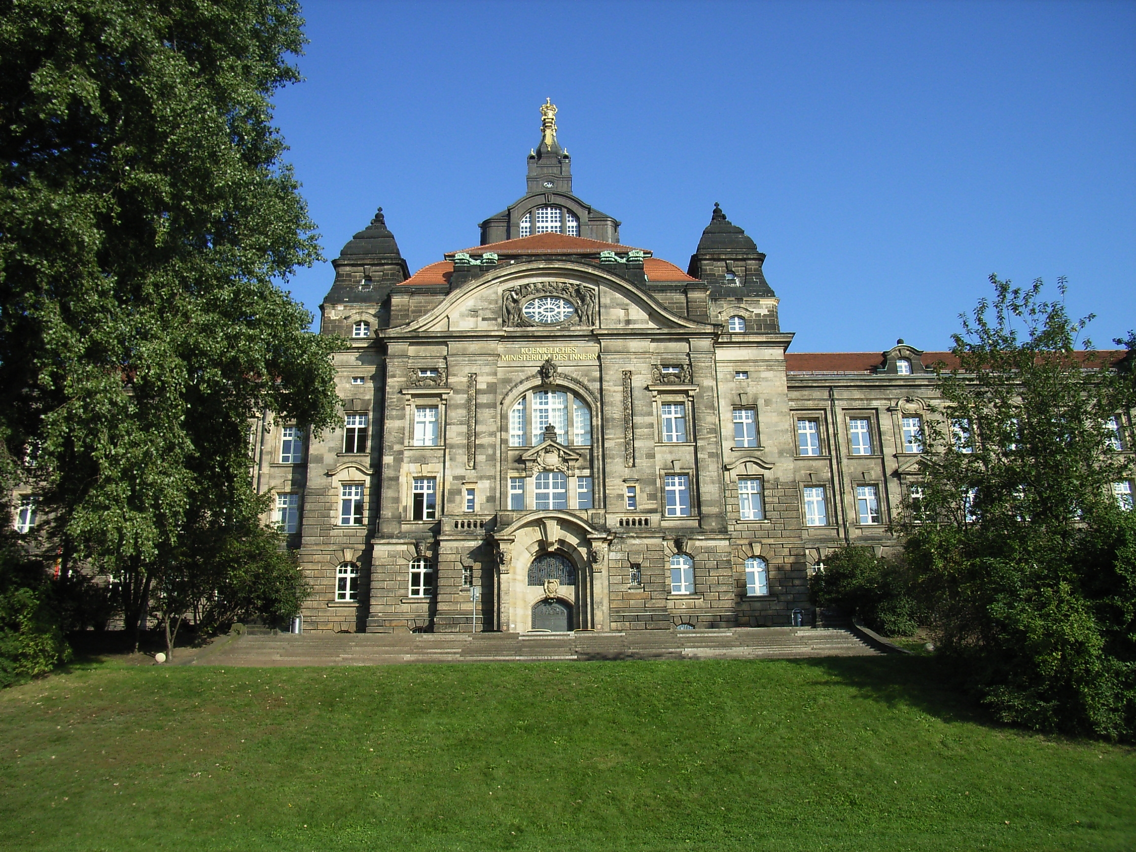 Sächsische Staatskanzlei, Dresden (Sachsen, Deutschland), Südfront (zur Elbe). Aufnahmedatum 2005-09-21.